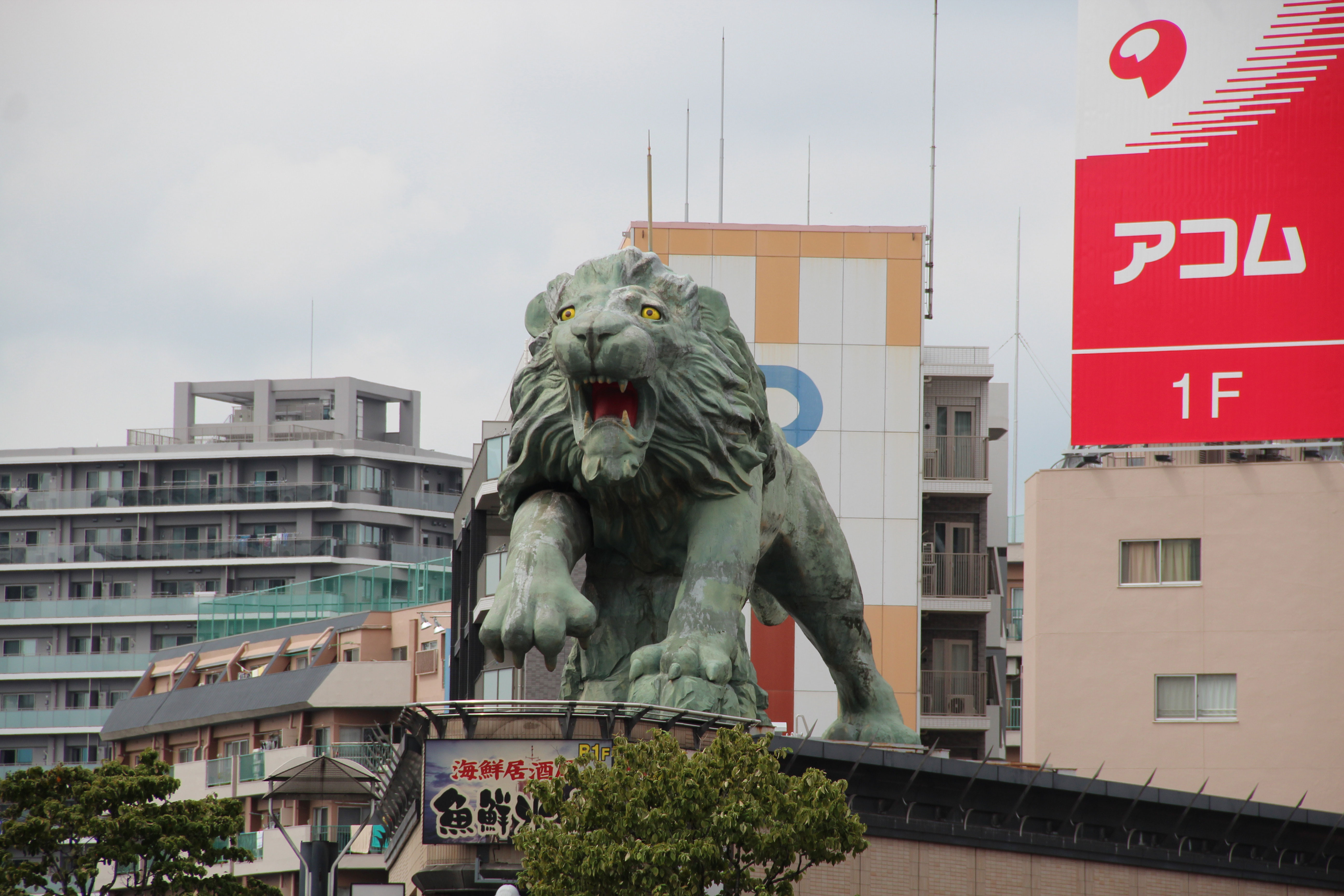 Granda statuo de leono apud la trajnstacio Kawaguchi.